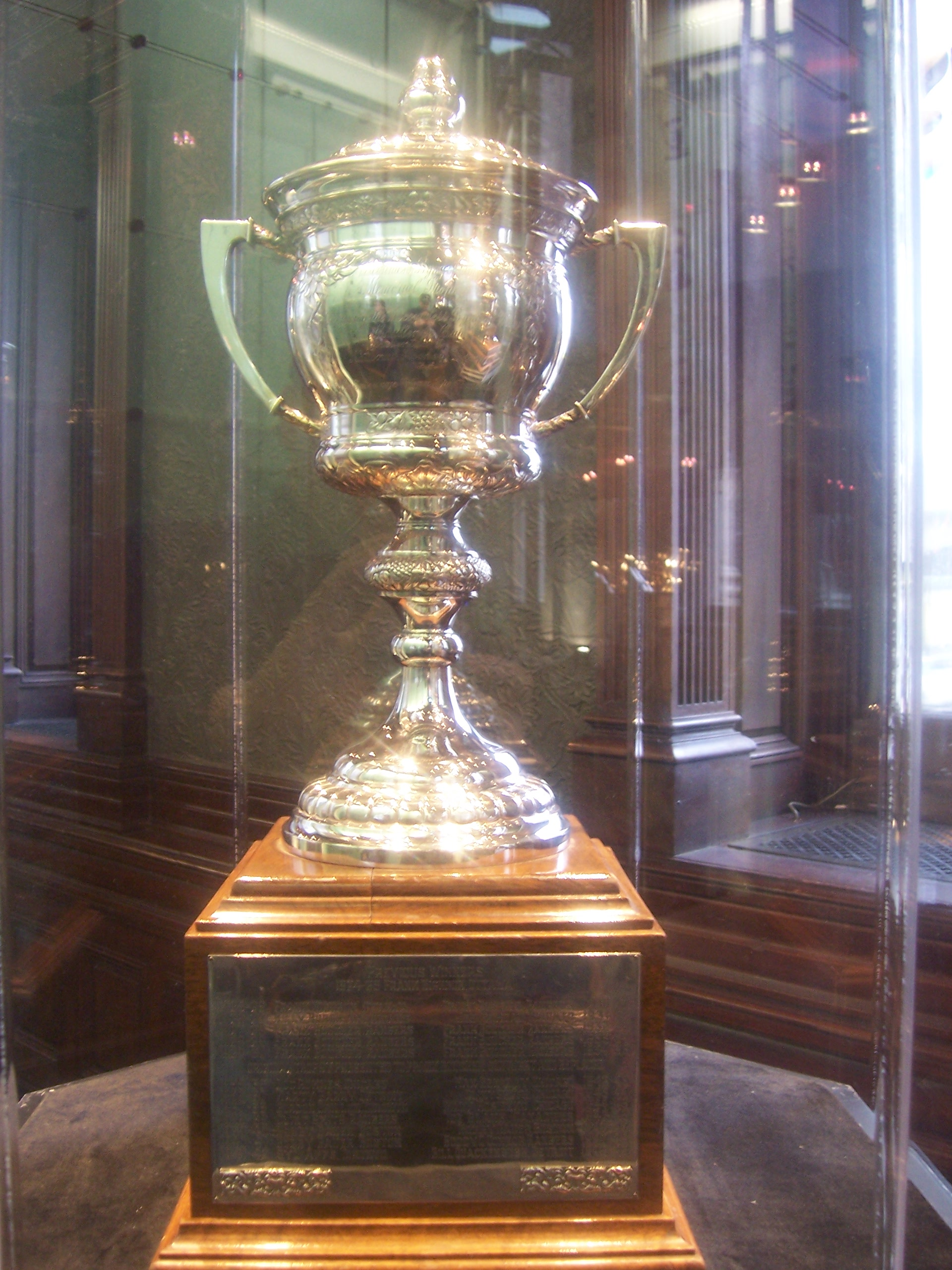 Lady Byng trophy